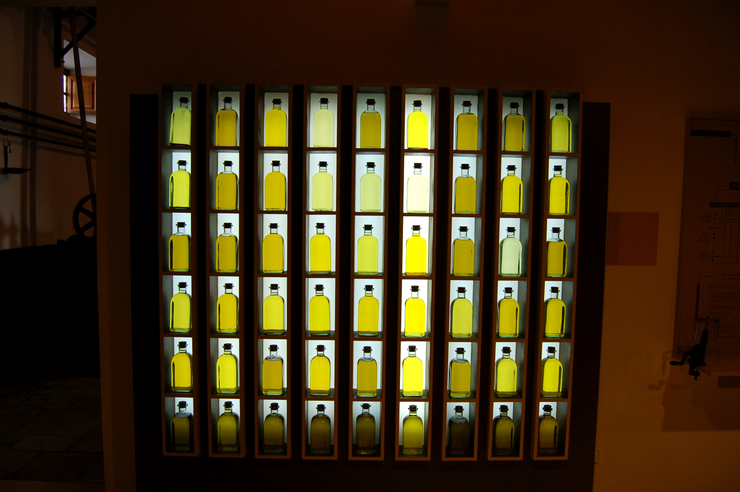 Museo del Olivar y el Aceite, Baena (España).